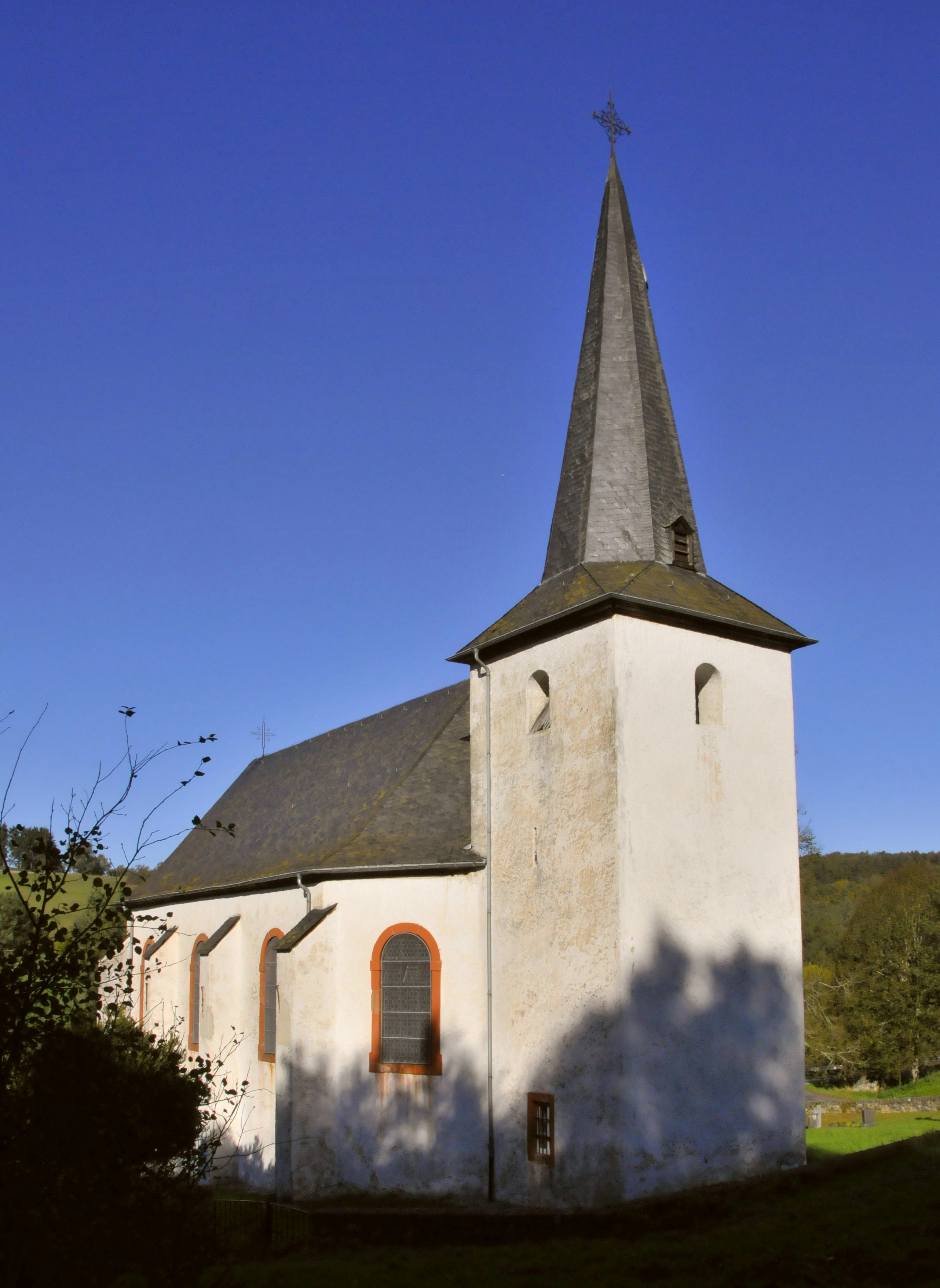 Walholzkirche in Weiperath